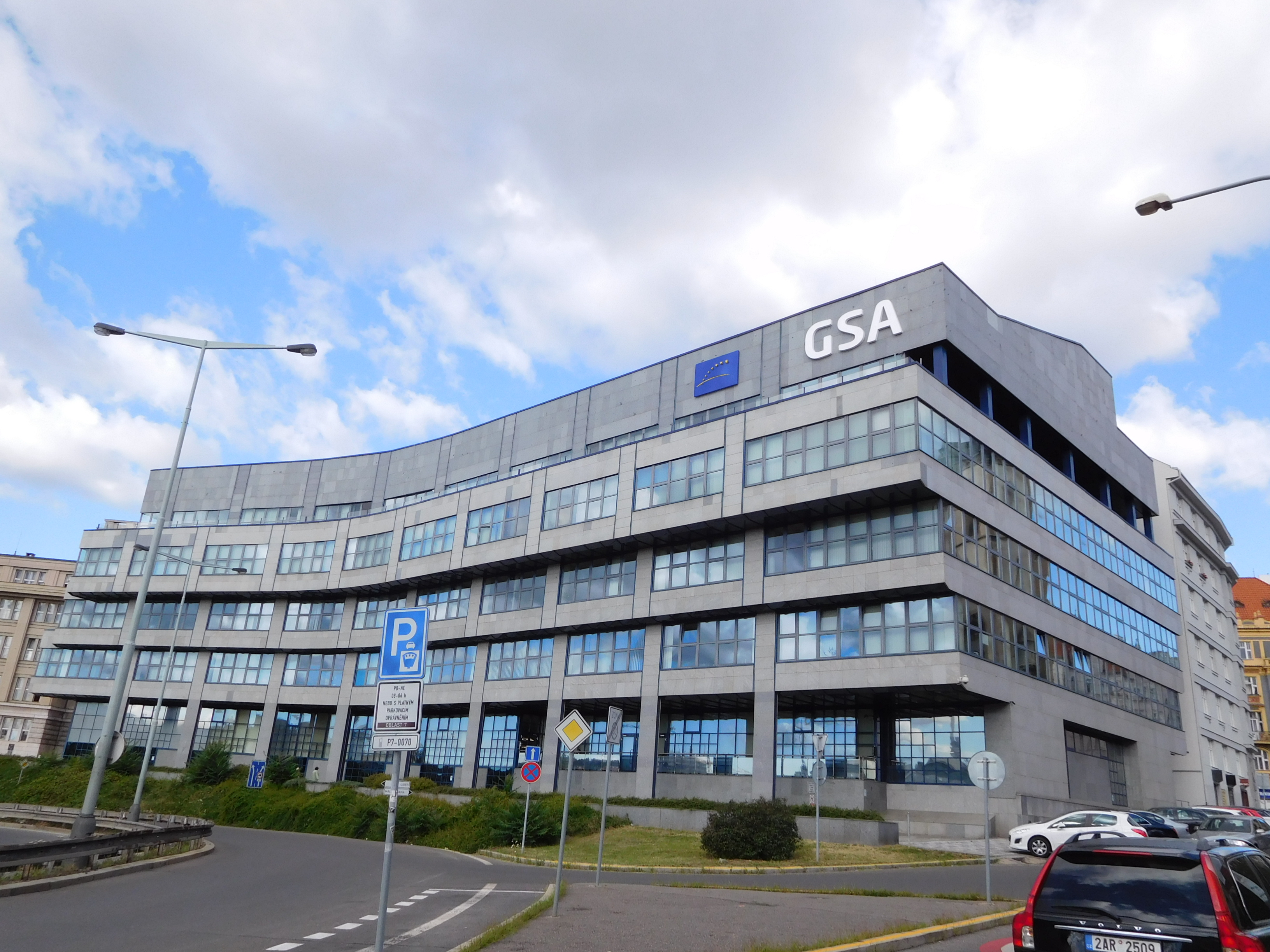 Praha - Holešovice, Janovského 2 - sídlo GSA, pohled od Bubenské